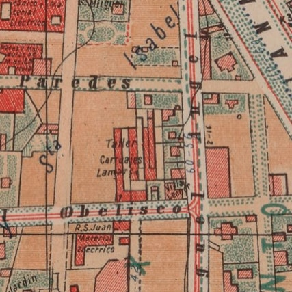 Hoja 3 del Plano de Madrid en 1900, dibujado por Facundo Cañada. Descripción física del plano total por el autor: "El plano consta de 6 hojas, cada una de las cuales mide 59 cm de altura por 72 cm de ancho (de trabajo, por supuesto, nada de anchos de cenefas), y, por lo tanto, al unirlas forman un plano que mide 1,44 metros de ancho y 1,77 de alto y las márgenes en blanco: se está tirando escrupulosamente en ocho colores y en superior papel, hallándose perfectamente grabado" (Facundo Cañada López, 1900). Descripción cartográfica del plato total: Plano de Madrid y Pueblos colindantes de Aravaca, Canillas, Canillejas, Carabanchel Alto, Carabanchel Bajo, Chamartín, El Pardo (Real Sitio), Fuencarral, Getafe, Hortaleza, Leganés, Pozuelo de Alarcón, con sus barrios de Húmera y Estación; Vallecas, Vicálvaro, Villaverde, etc, al principiar el siglo XX. El plano va acompañado de una Guía, con el Directorio de Madrid y otras notas aclaratorias. Información estadística y nomenclator del plano por el autor: La superficie del término municipal de Madrid de la época es de 821.189.581 pies cuadrados, equivalentes a 18.621 fanegas del marco de Madrid o sean 6475 hectáreas y 54 áreas; resultando de dicha superficie una proporción de 120,52 metros cuadrados por habitante, pues estos son 528.984, según el último empadronamiento general verificado en 1º de Diciembre de 1900. En el plano se fijan los nombres de las plazas, calles, callejones, cuestas, etc., que en la actualidad tienen, detallándose la numeración que a cada casa corresponde, dentro de cada manzana, pues se fijan los primeros y últimos números de cada una de éstas al principiar las calles, y después los últimos en las manzanas sucesivas, y de esta manera resulta toda la numeración de cada calle.